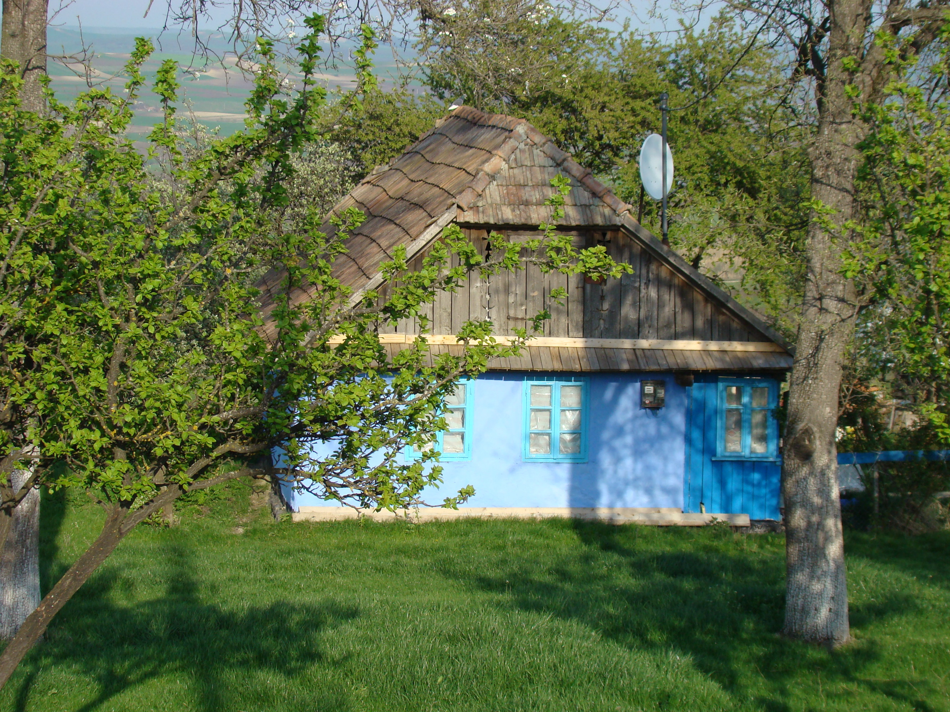 Casa scriitorului Dan Pavel din satul Clapa, comuna Tritenii de Jos, județul Cluj